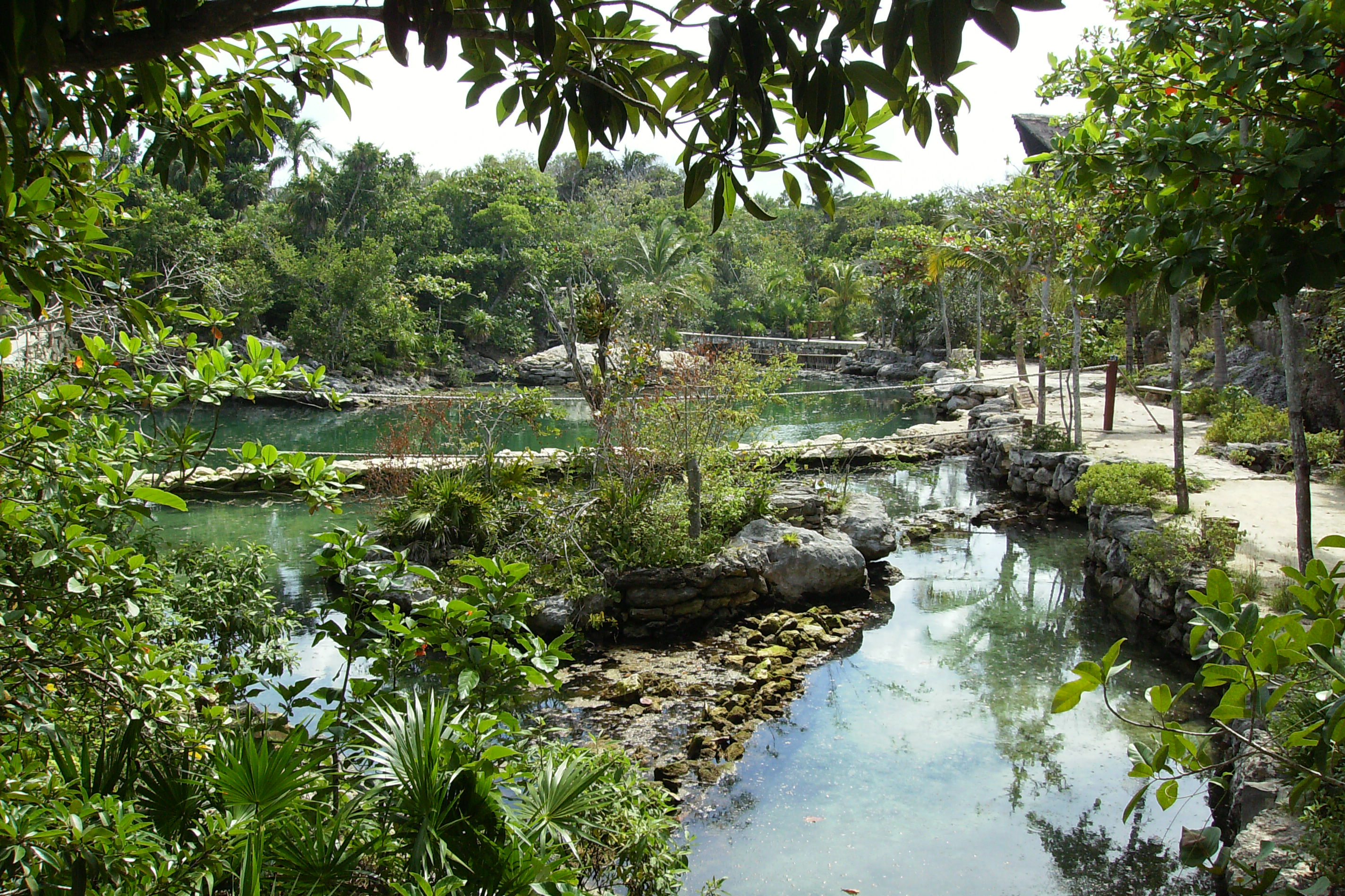 Xcaret pond